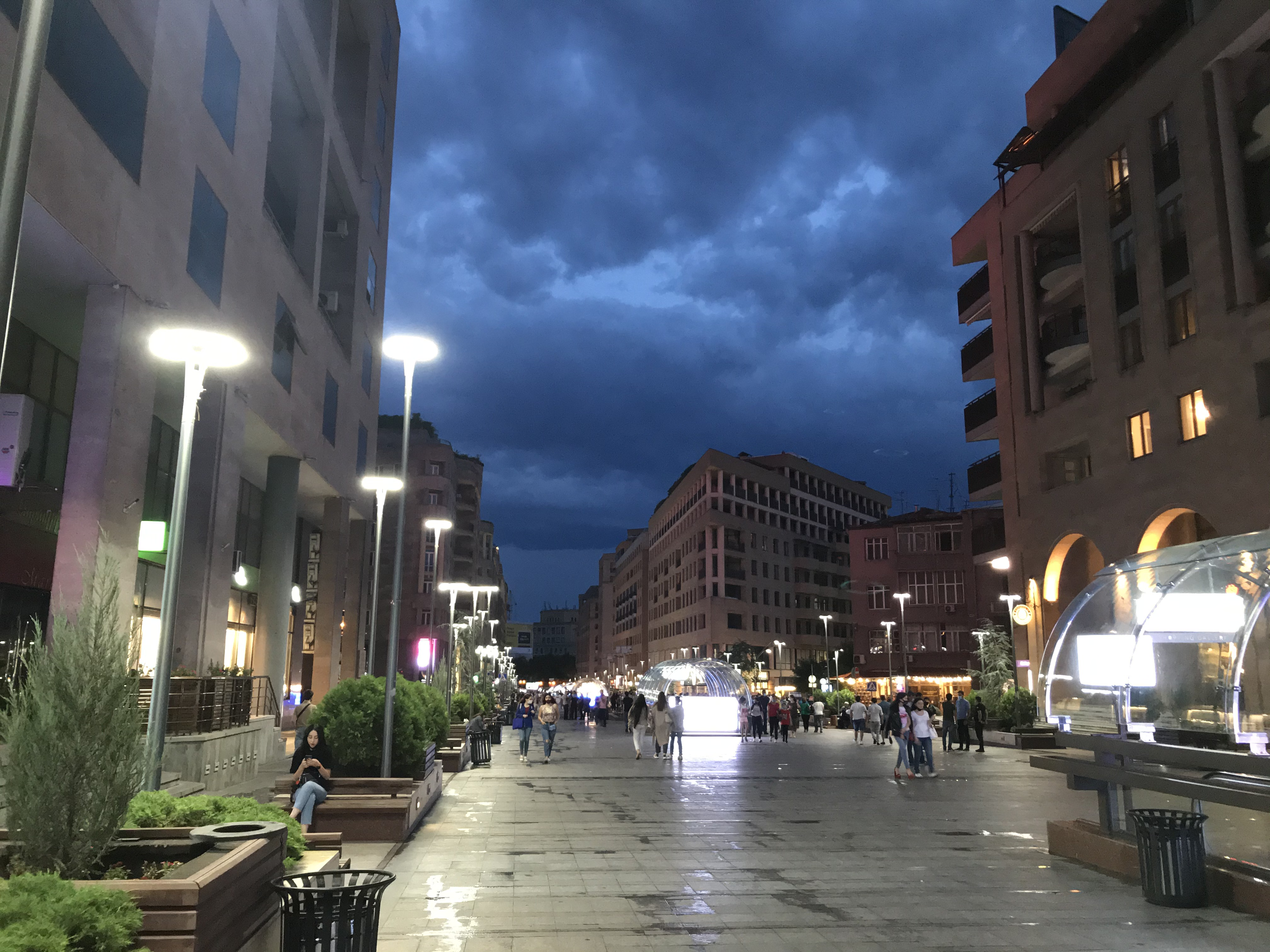 Северный проспект в Ереване после отмены карантина и введении требования о повсеместном обязательном ношении защитных масок